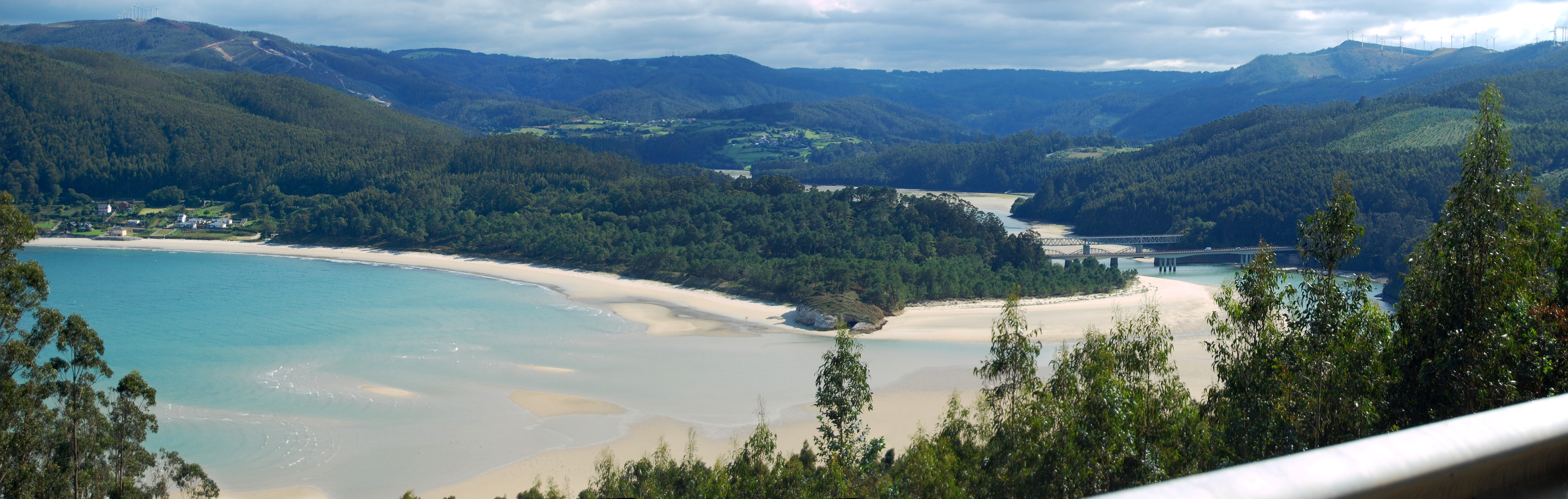 Desembocadura do río Sor na ría do Barqueiro, co Vicedo ó fondo. This is a photography of a Special Area of Conservation in Spain with the ID: ES1120017. Natura2000 entry, EEA entry